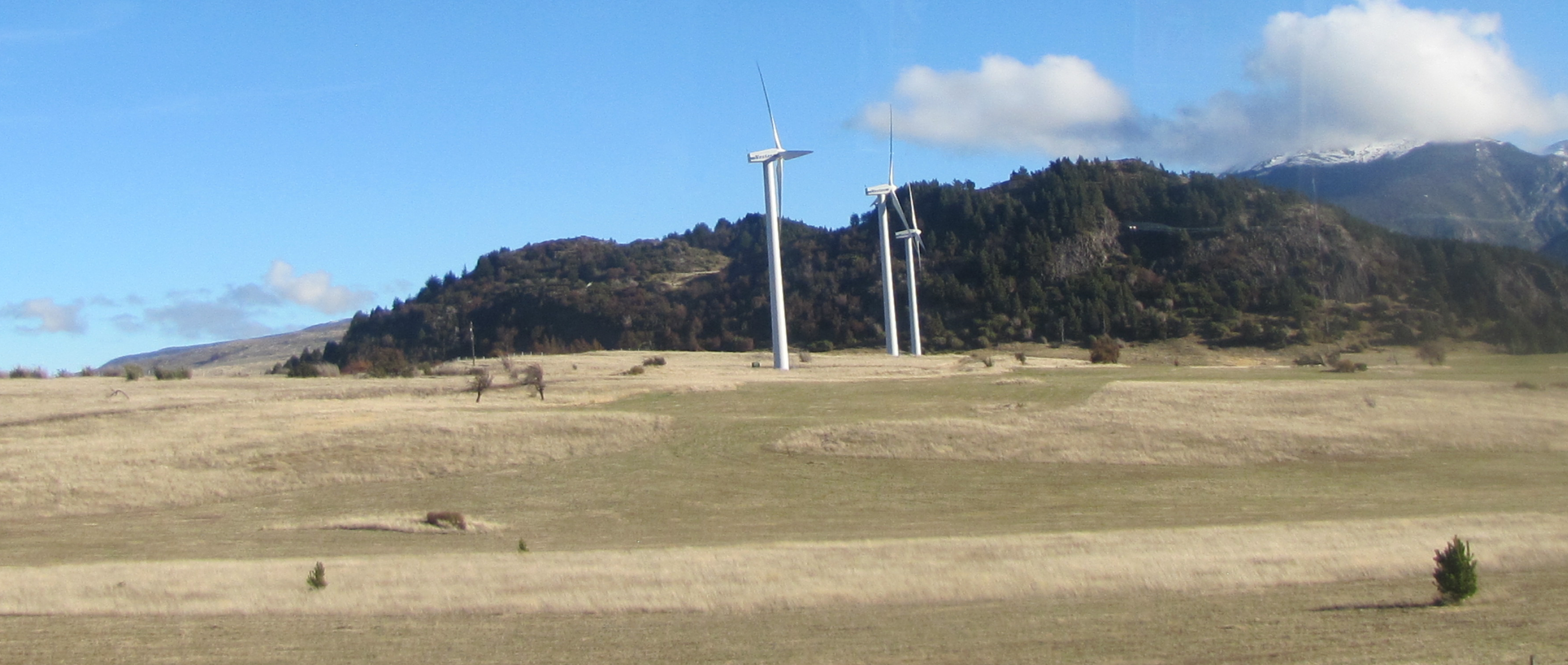 Generadores eólicos en las cercanías de Coyhaique, región de Aysén, Chile.